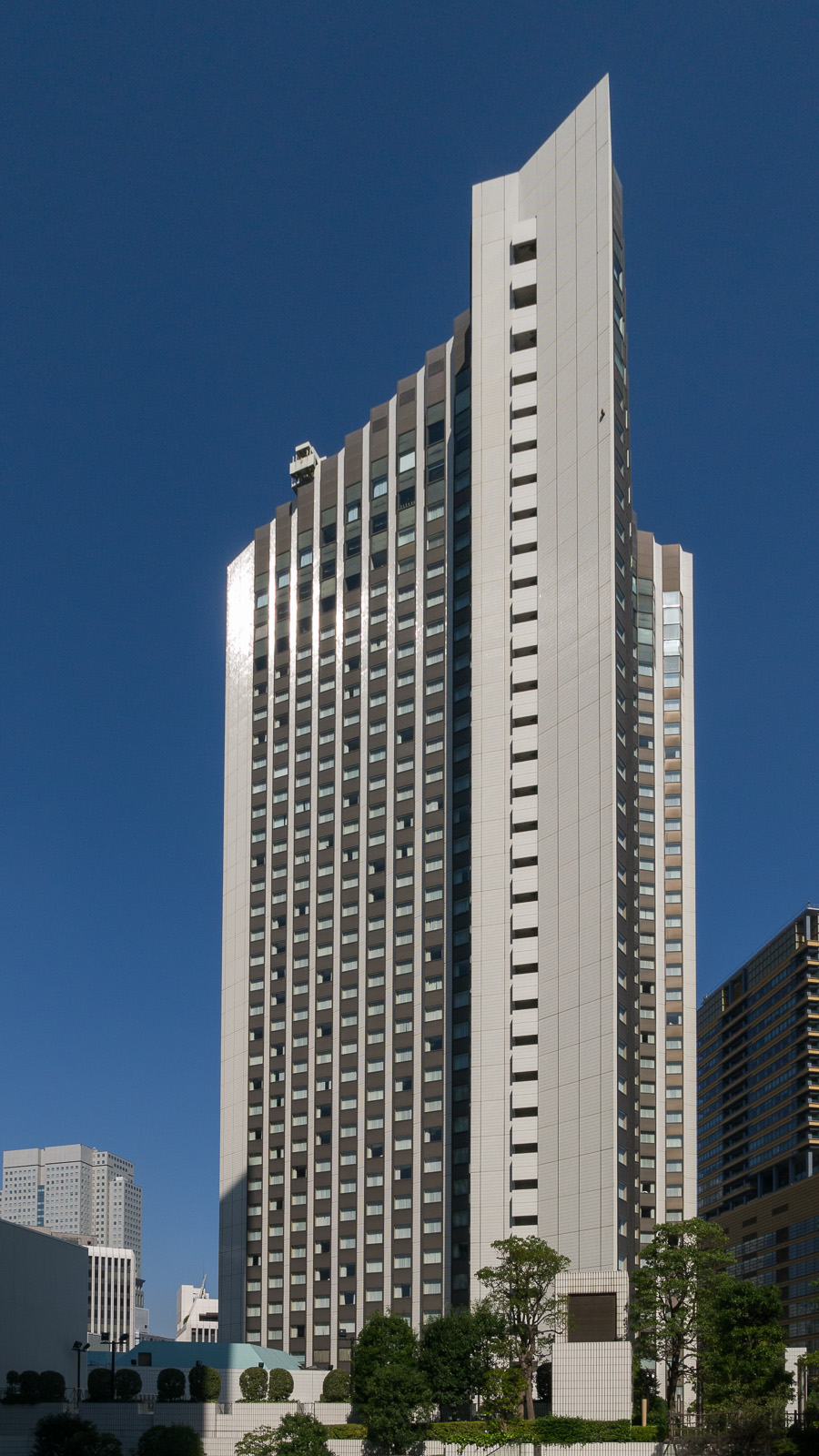 アークヒルズ、ANAインターコンチネンタルホテル東京。